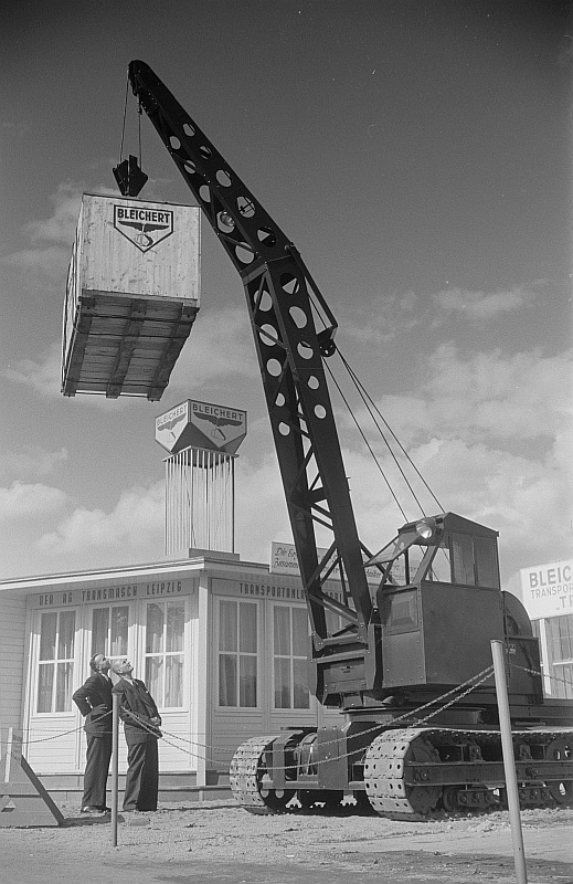 Original image description from the Deutsche Fotothek Kran der Firma Bleichert (Transportanlagenfabrik der AG Transmasch)